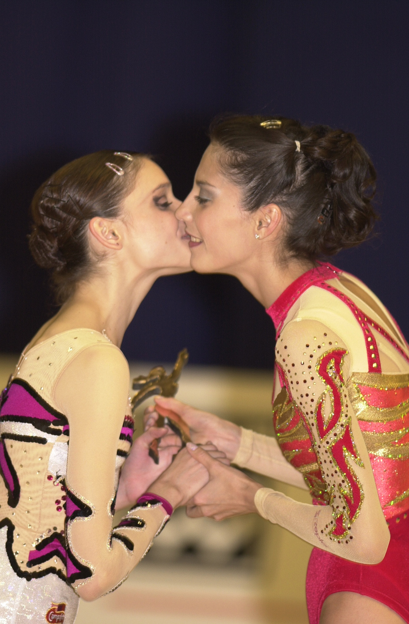 Esther Domínguez recibe el Premio Longines a la Elegancia de manos de Elena Vitrichenko en el Campeonato Europeo de Zaragoza en el año 2000.